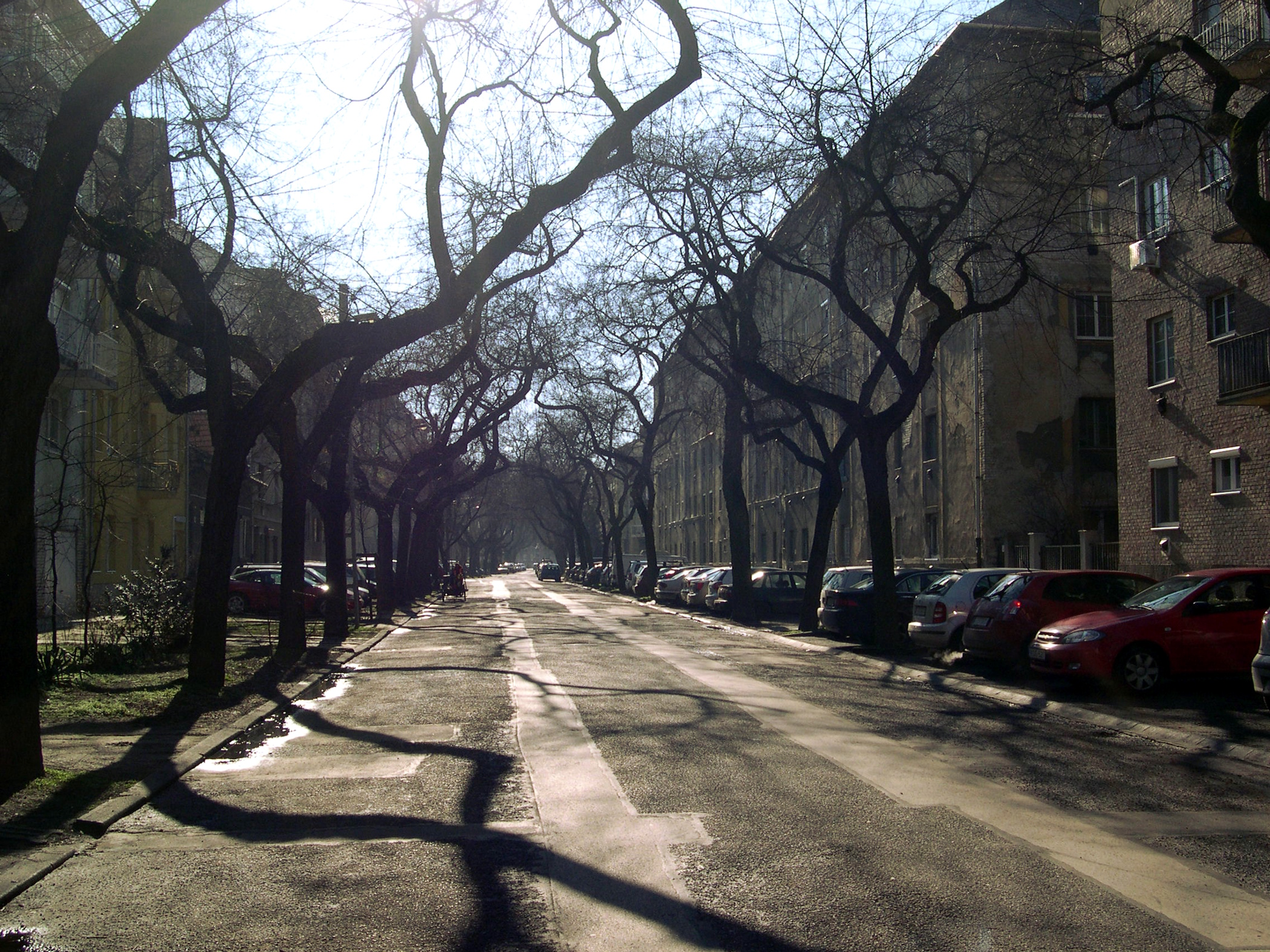 XIV. kerület, Varsó utca